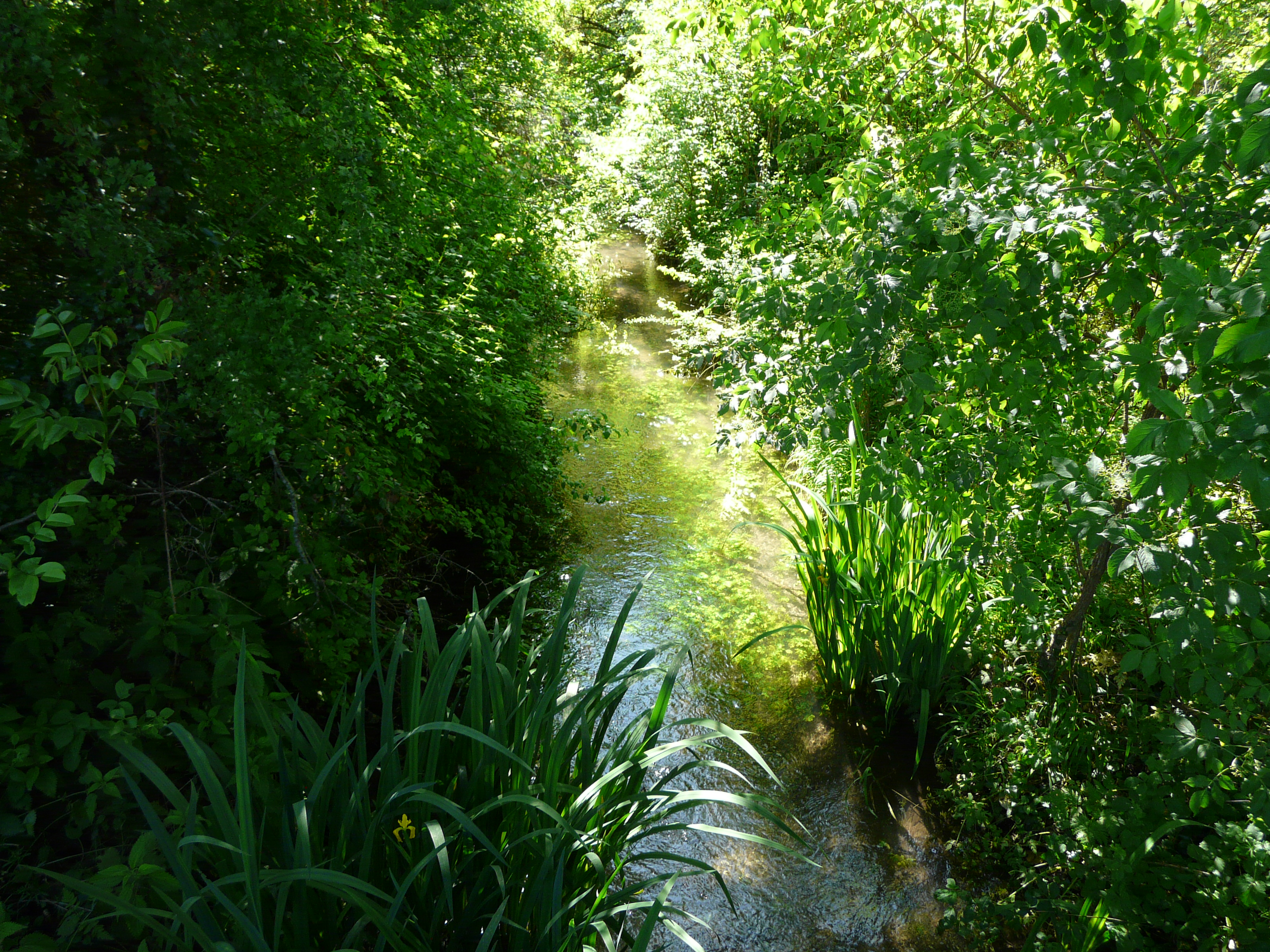 Le Vern en amont du pont menant aux Feydies, Salon, Dordogne, France.